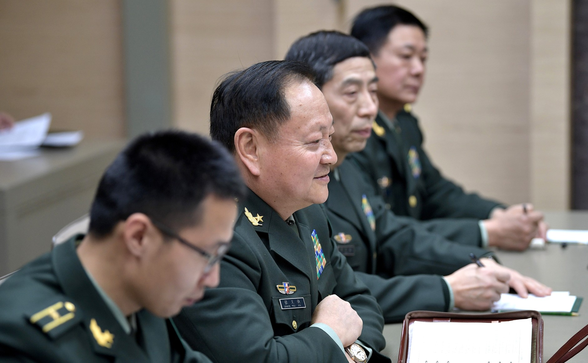 Заместитель председателя Центрального военного совета Коммунистической партии Китая, председатель китайской части Российско-китайской смешанной межправительственной комиссии по военно-техническому сотрудничеству Чжан Юся во время встречи с Президентом России Владимиром Путиным и Министром обороны России Сергеем Шойгу